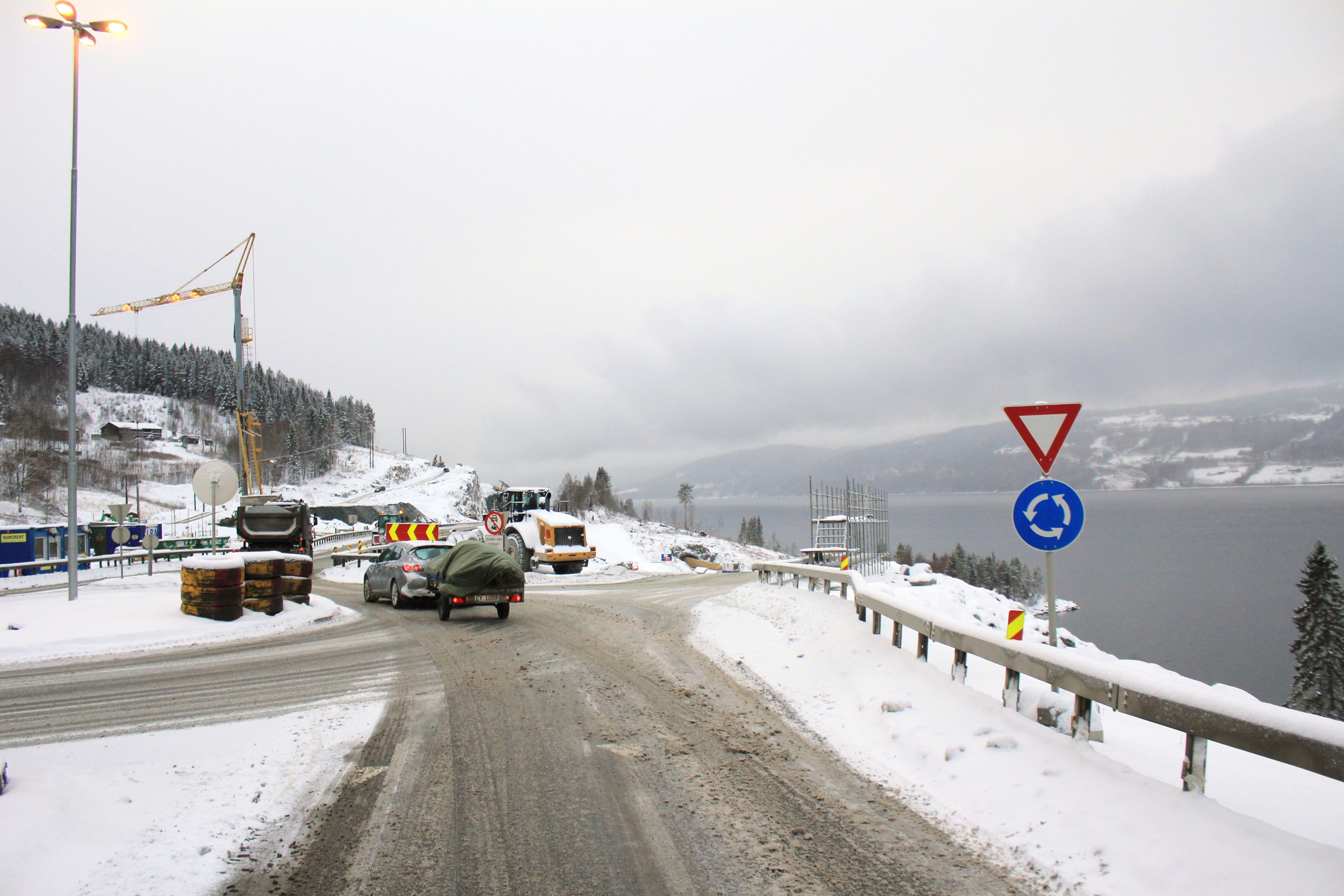 E6 vegutbygging Kolomoen - Minnesund ved Mjøsa en desemberdag 2013.